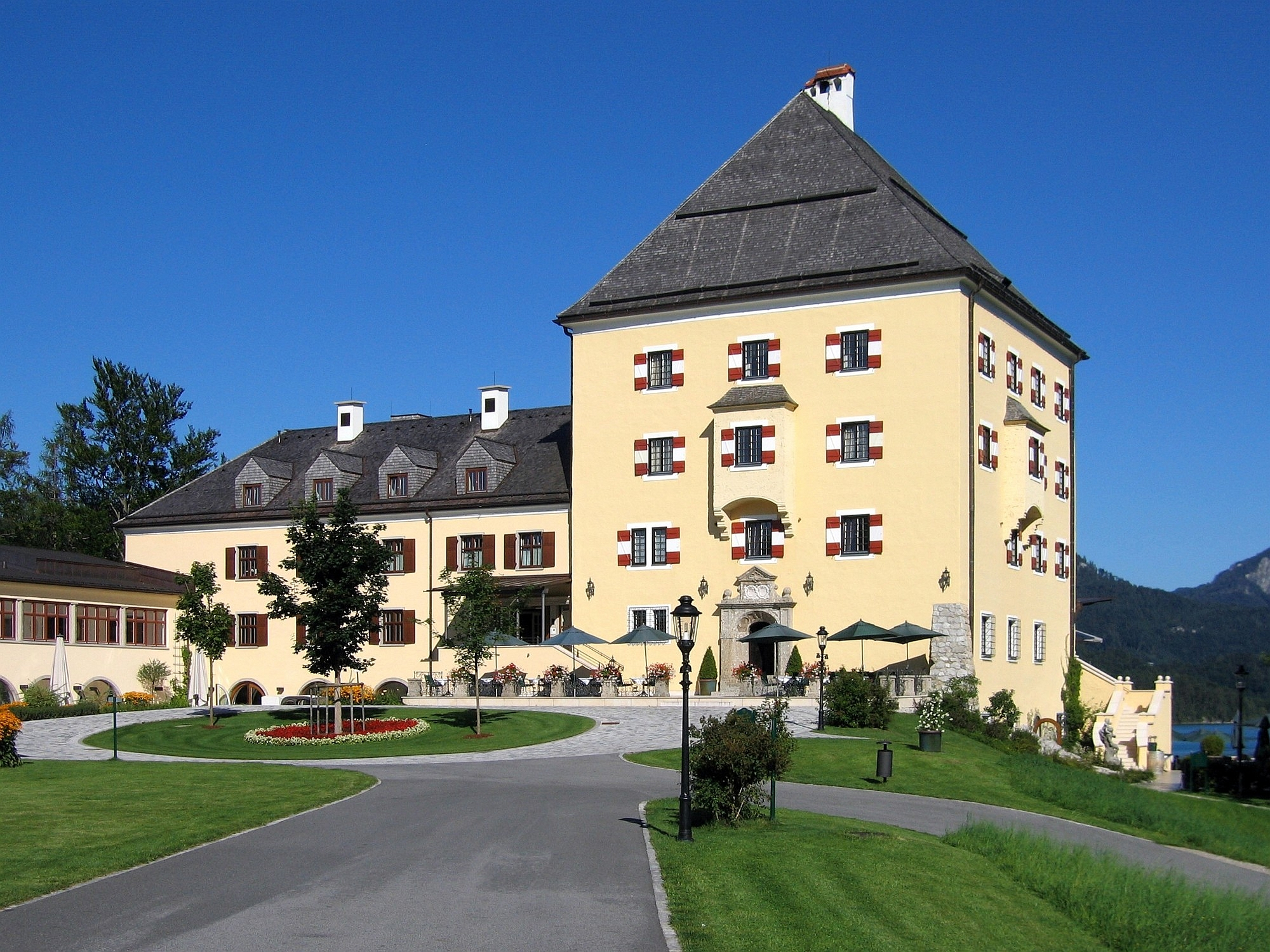 Schloss Fuschl - Fuschlsee - Bundesland Salzburg - Österreich